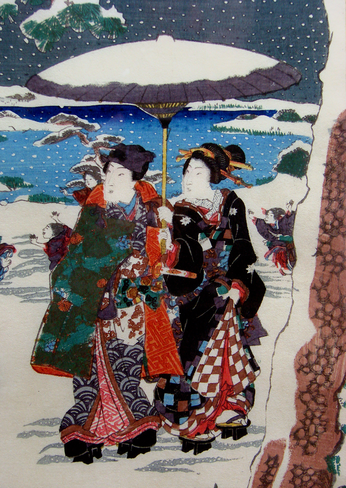 Illustration du Genji Monogatari, 19ème siècle (détail). Musée Saint-Remi à Reims.